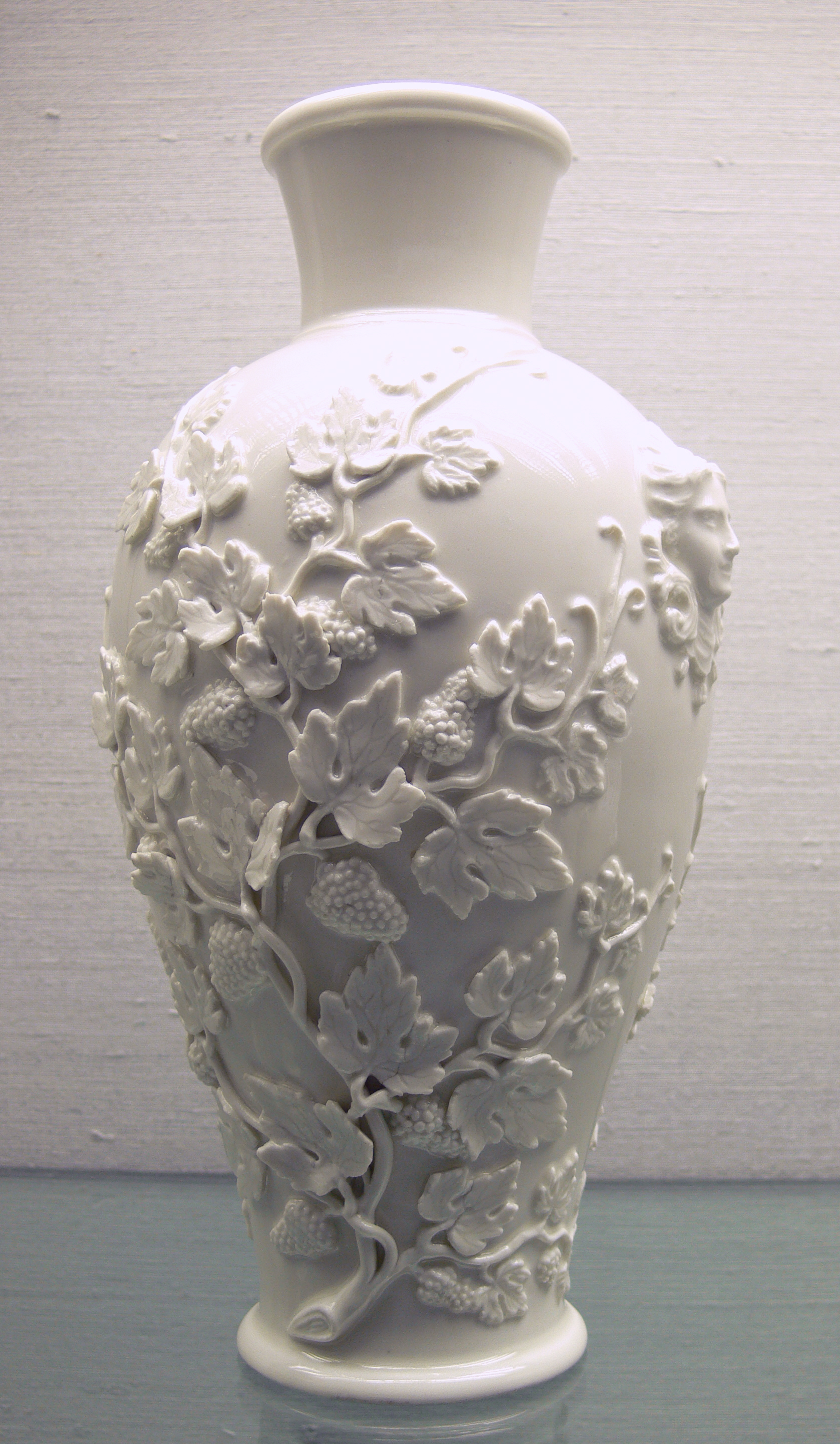 Vase mit Weinreben, Böttgerporzellan, Meißen 1713–1720 Kunstgewerbemuseum Berlin, Inv. Nr. M 1125